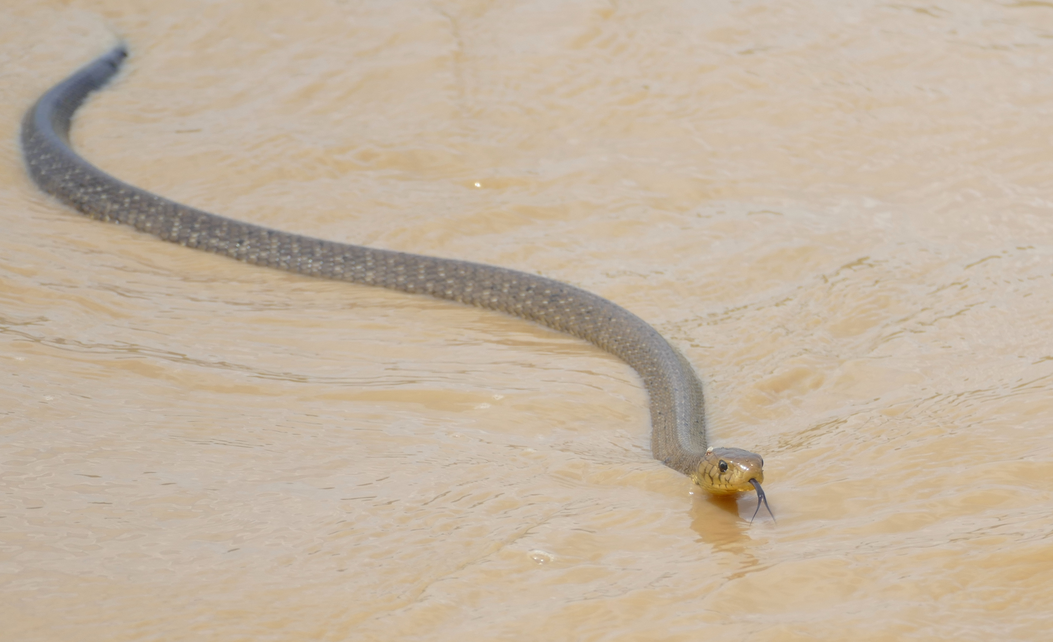 Hippo Cruise, St Lucia, KwaZulu-Natal, SOUTH AFRICA